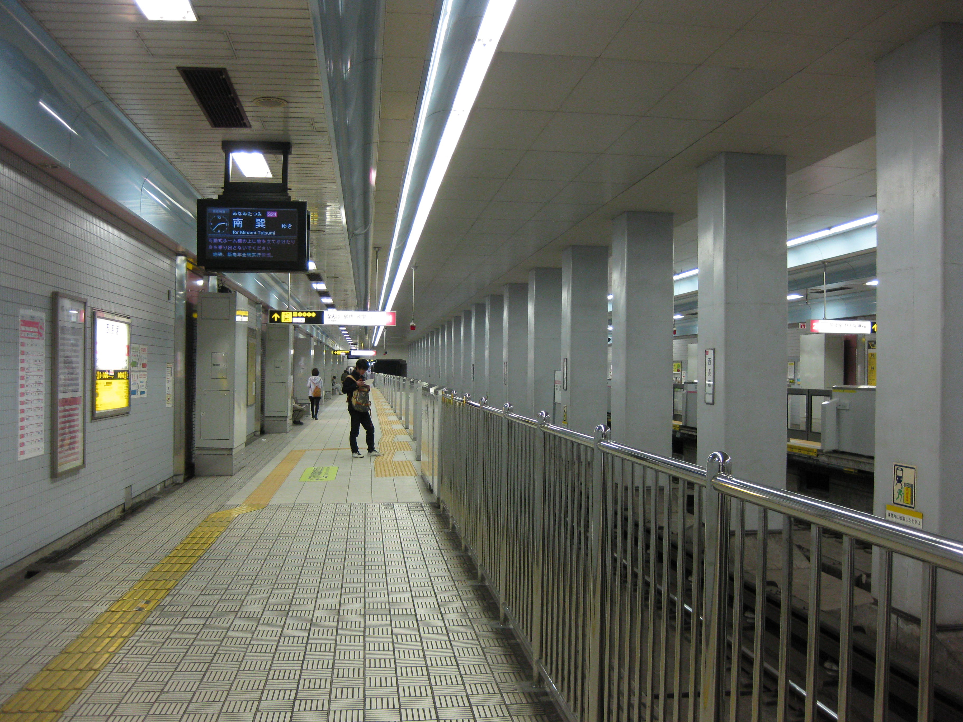 ホームドア設置後のja:西長堀駅千日前線プラットホーム